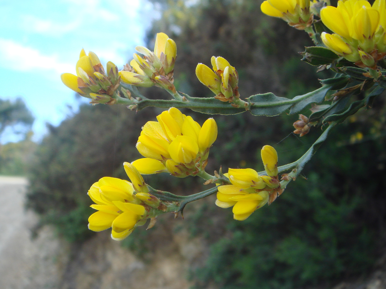 Carquesa (Genista tridentata) Ceuta, España.